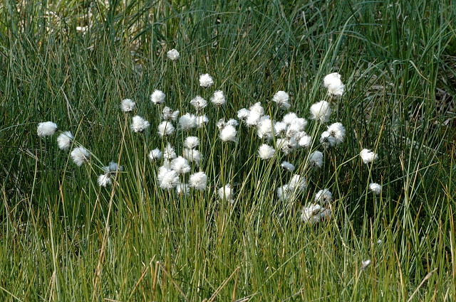 Picture taken in Commanster, Belgian High Ardennes . Species: Eriophorum vaginatum